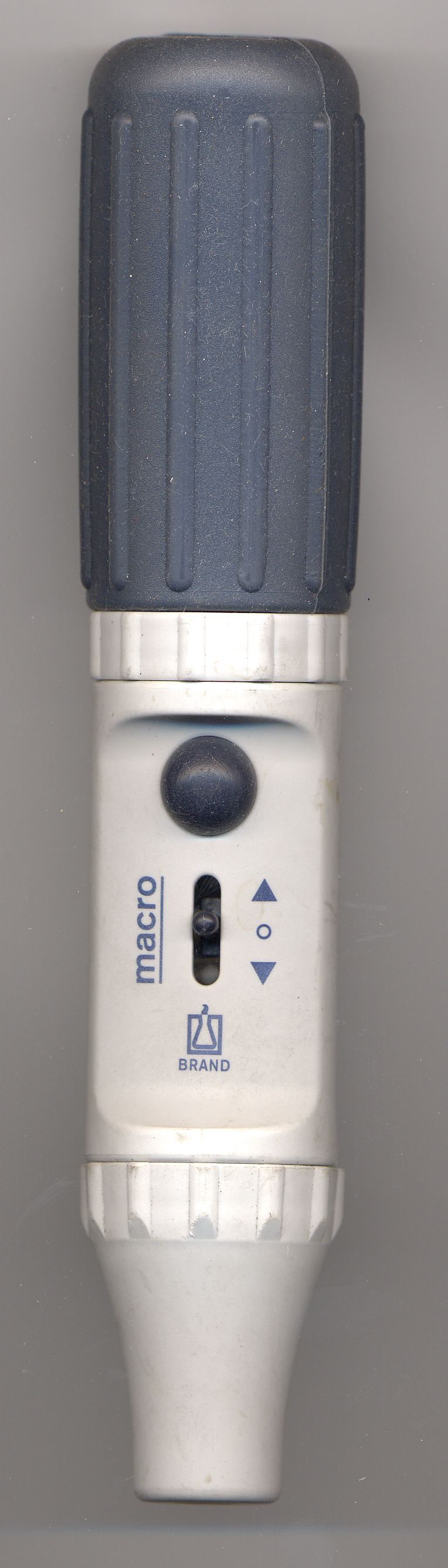 Pipettier-Hilfe